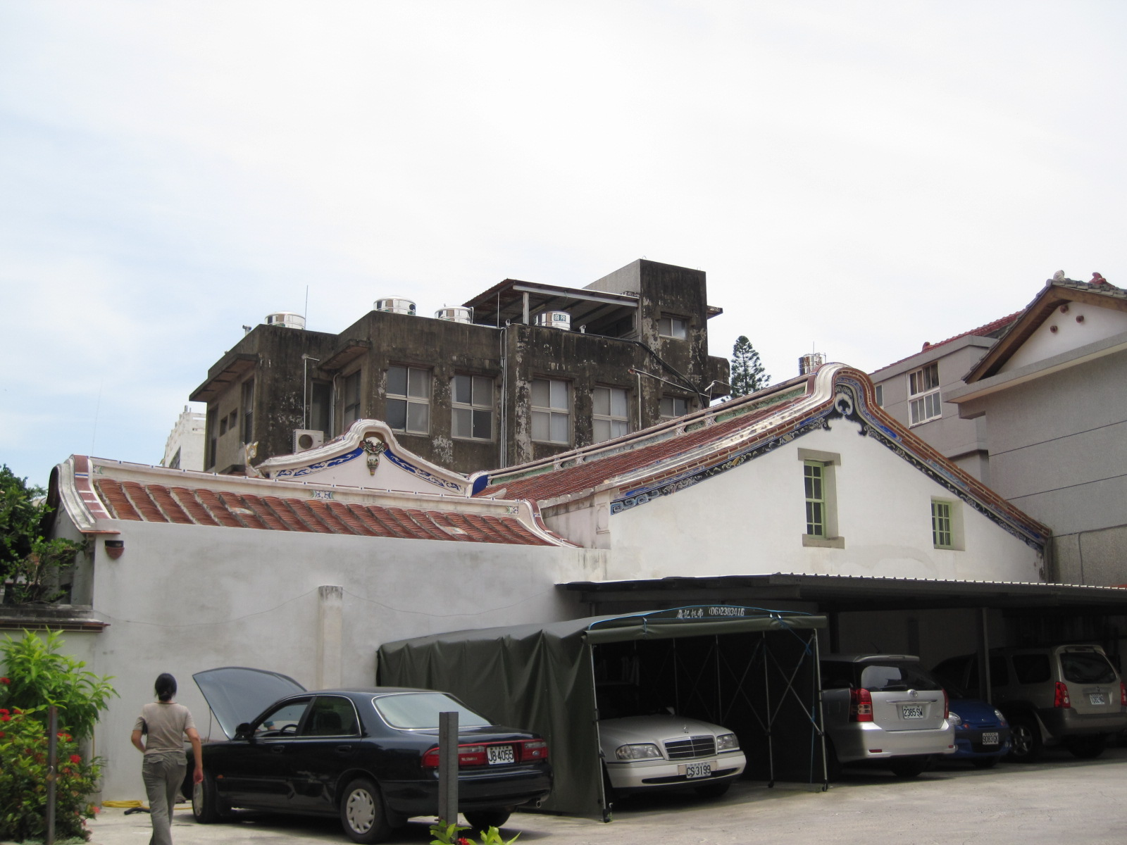 擇賢堂側面